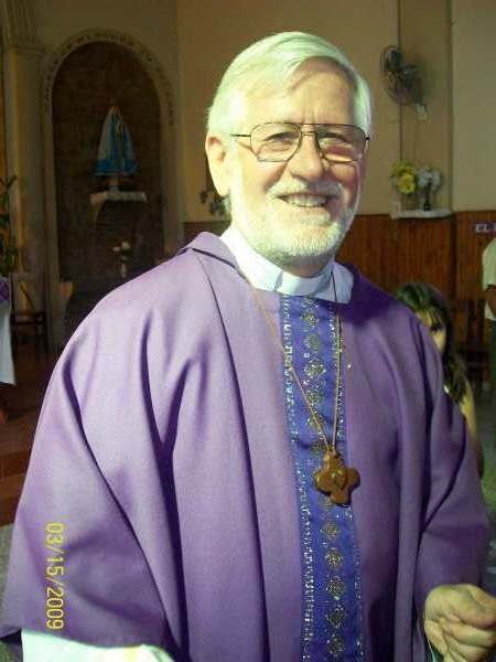 Marcello Palentini- Vescovo di jujui